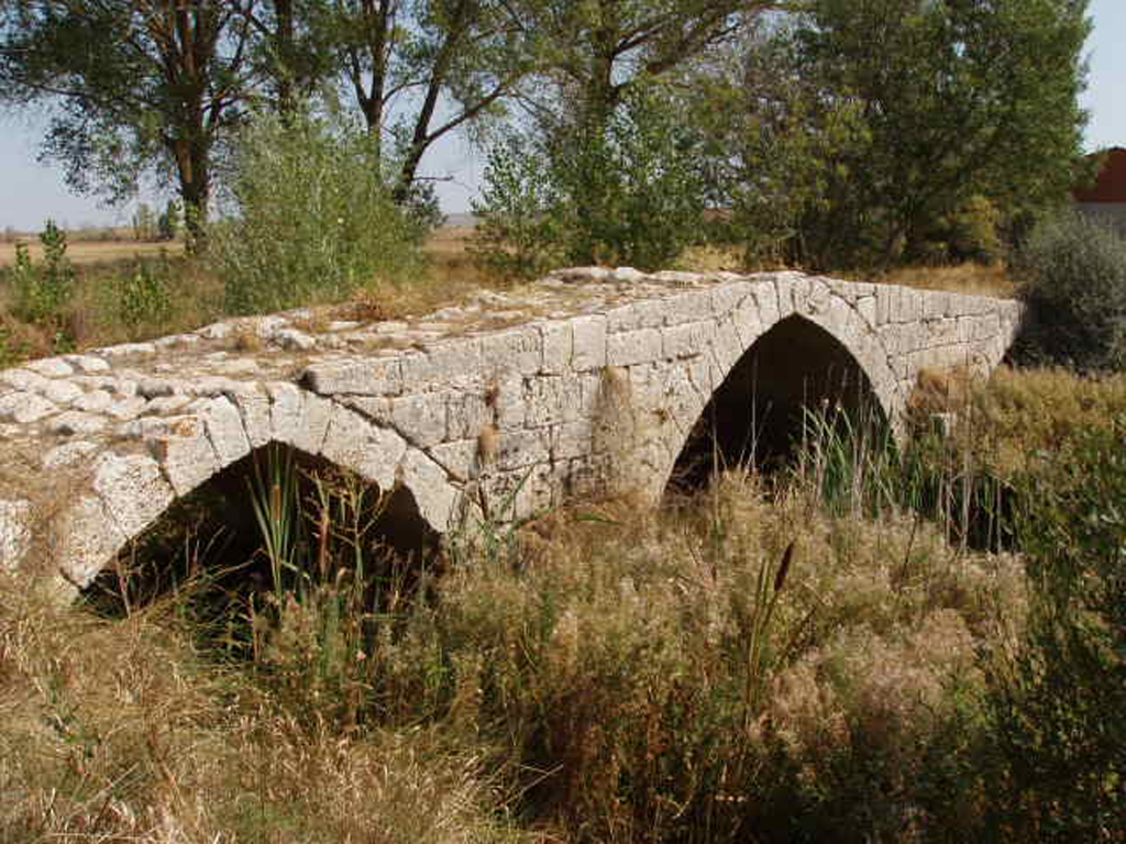 Puente romano sobre calzada romana Sasamón, Burgos, España